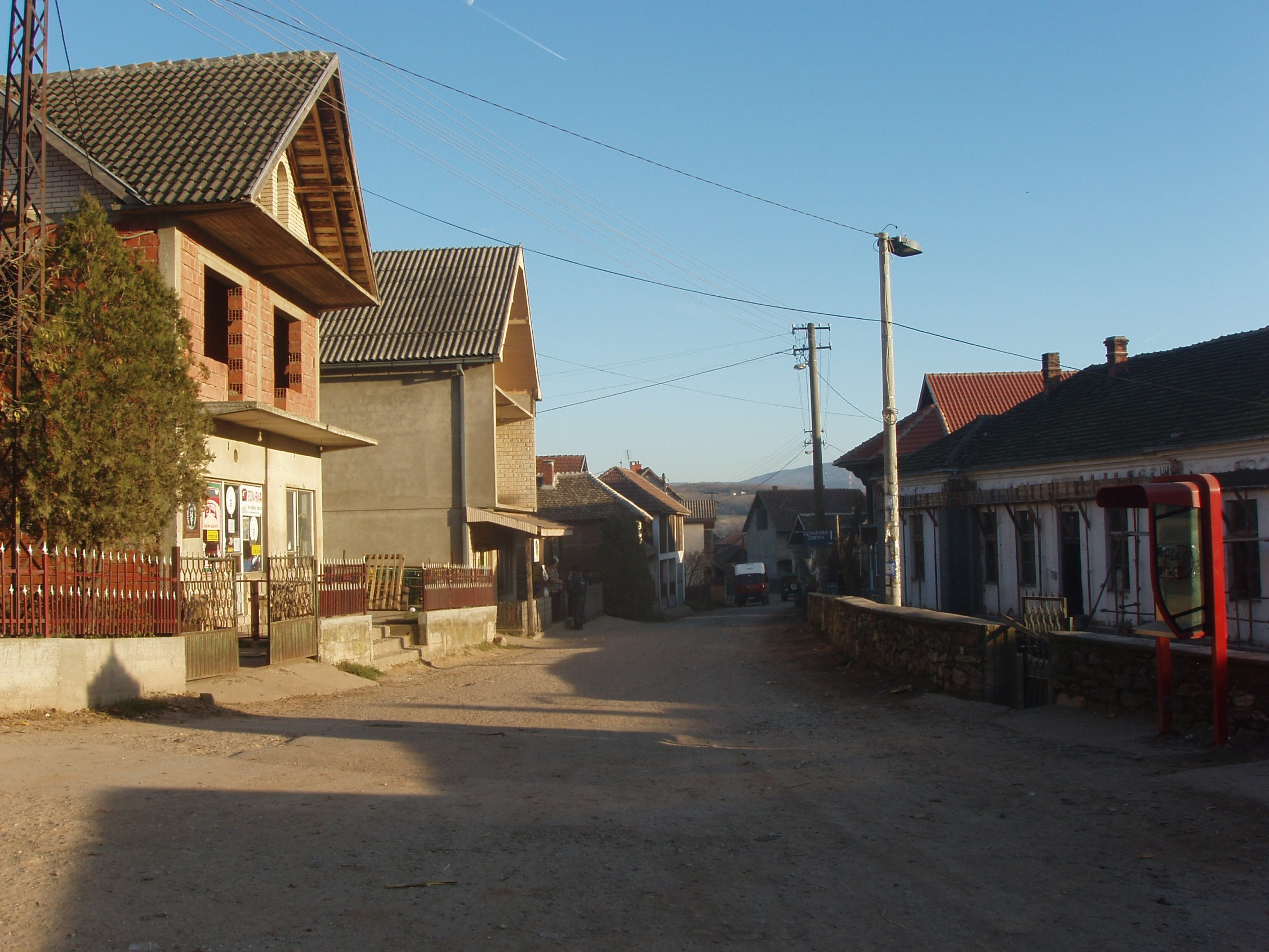 Скорица - средиште - Skorica - Centre